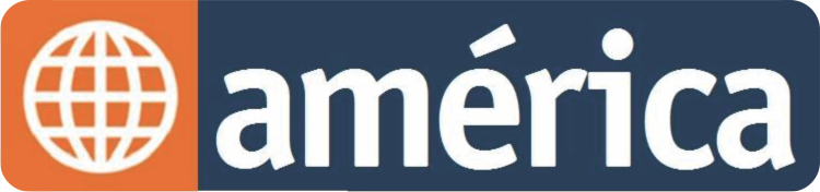 Reproducción del logo de América Televisión, canal de televisión abierta del Perú.